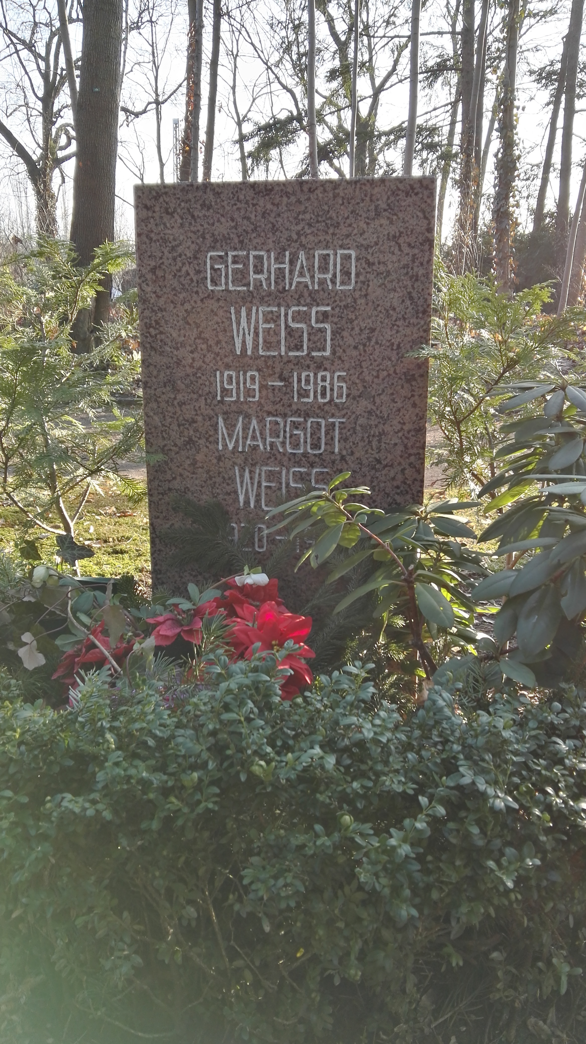 Grab von Gerhard Weiss und Margot Weiss in der Grabanlage Pergolenweg auf dem Sozialistenfriedhof des Zentralfriedhofs Friedrichsfelde